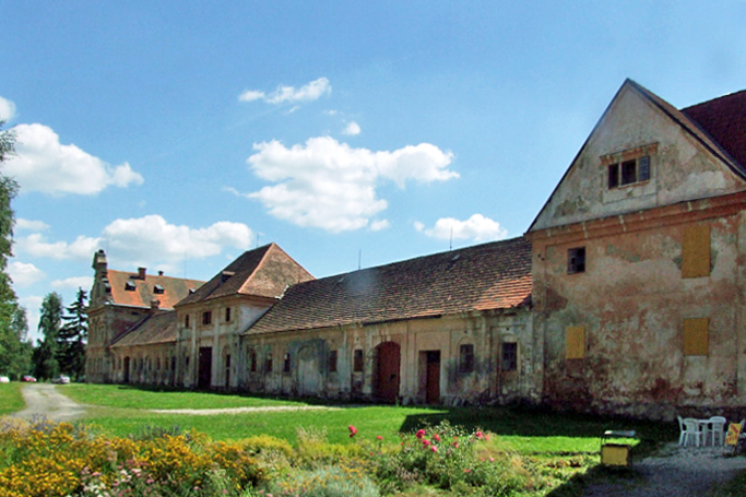 Stift Tepl